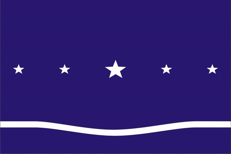 Bandera oficial de la ciudad de Río Tercero